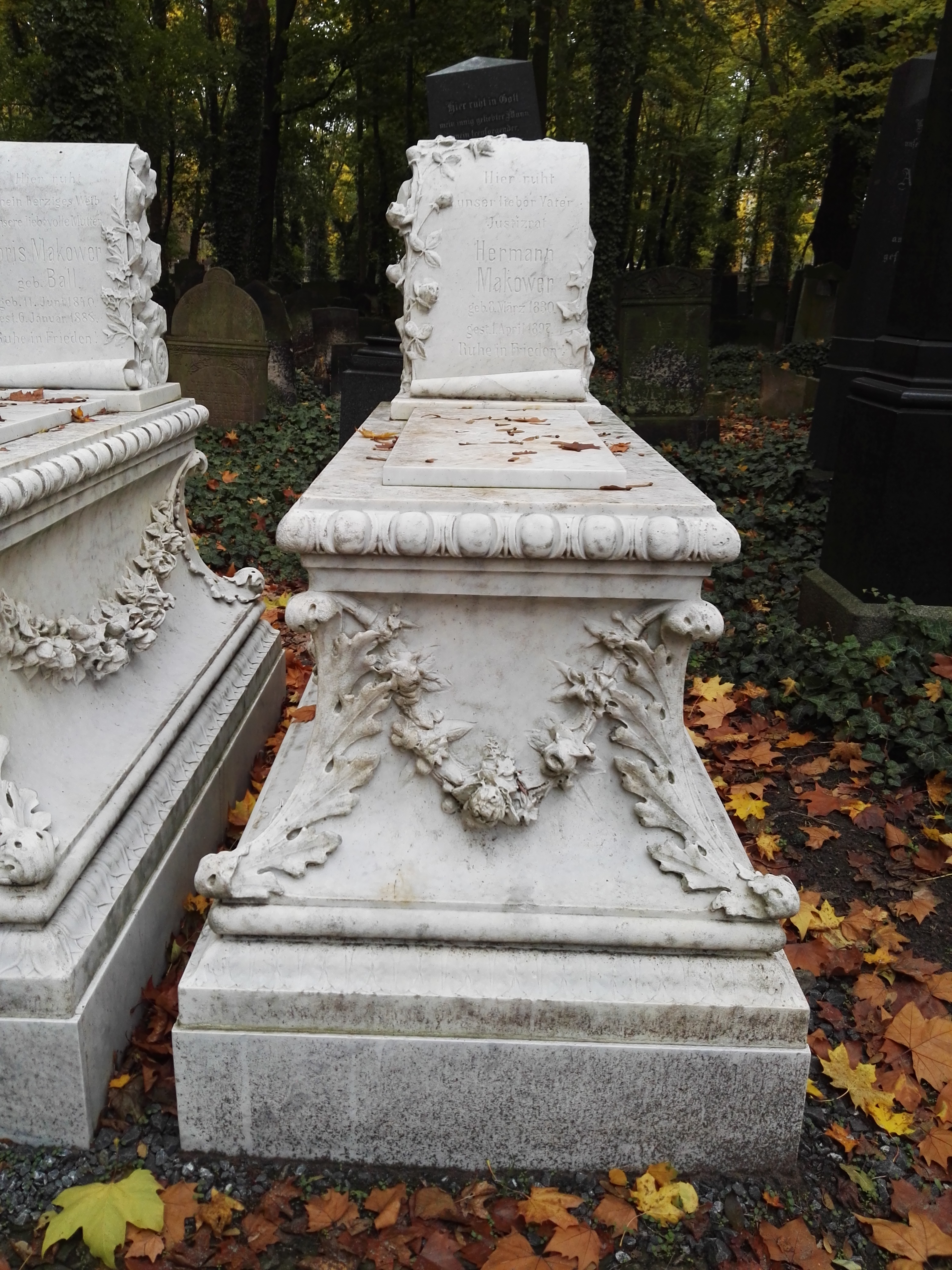 Grab von Hermann Makower auf dem Jüdischer Friedhof Schönhauser Allee in Berlin-Prenzlauer Berg